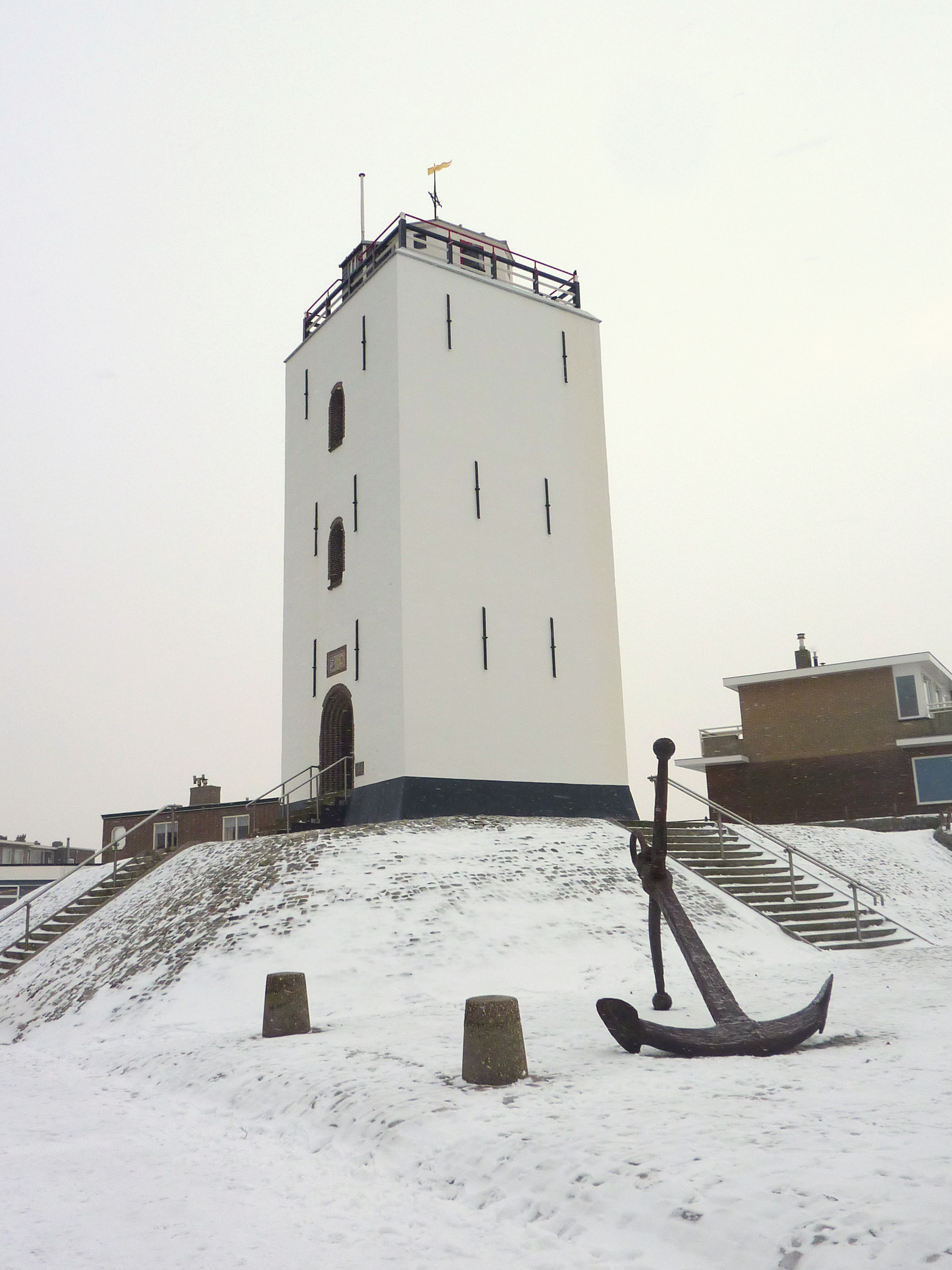 Katwijk, vuurbaak